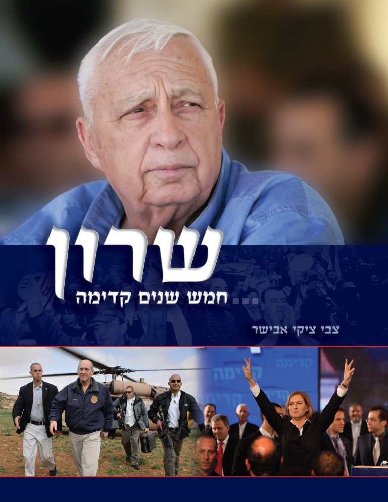 כריכת הספר "שרון - חמש שנים קדימה"